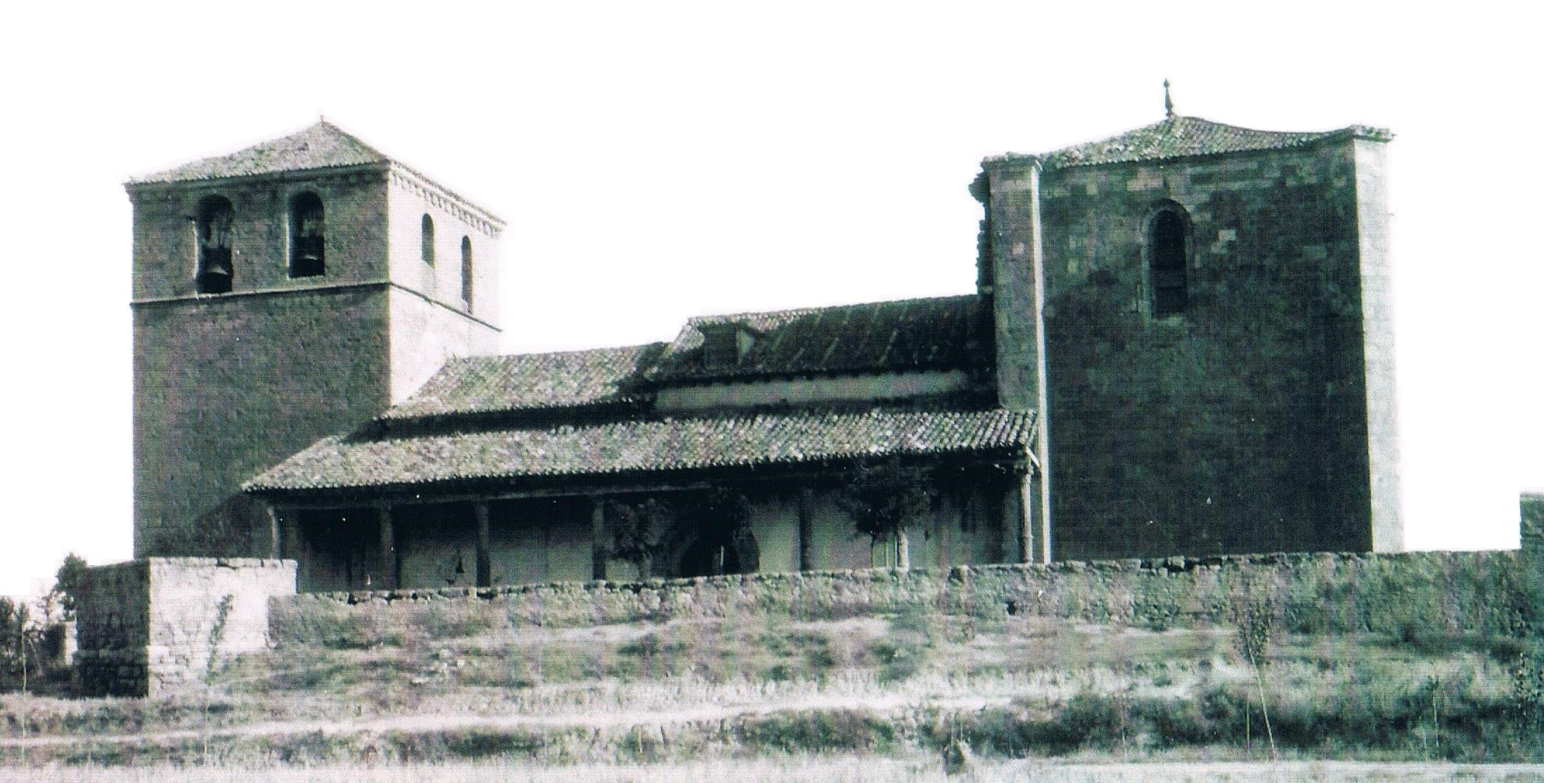 Fotografía antigua de la iglesia de San Nicolas de Bari de Sinovas, en la provincia de Burgos.